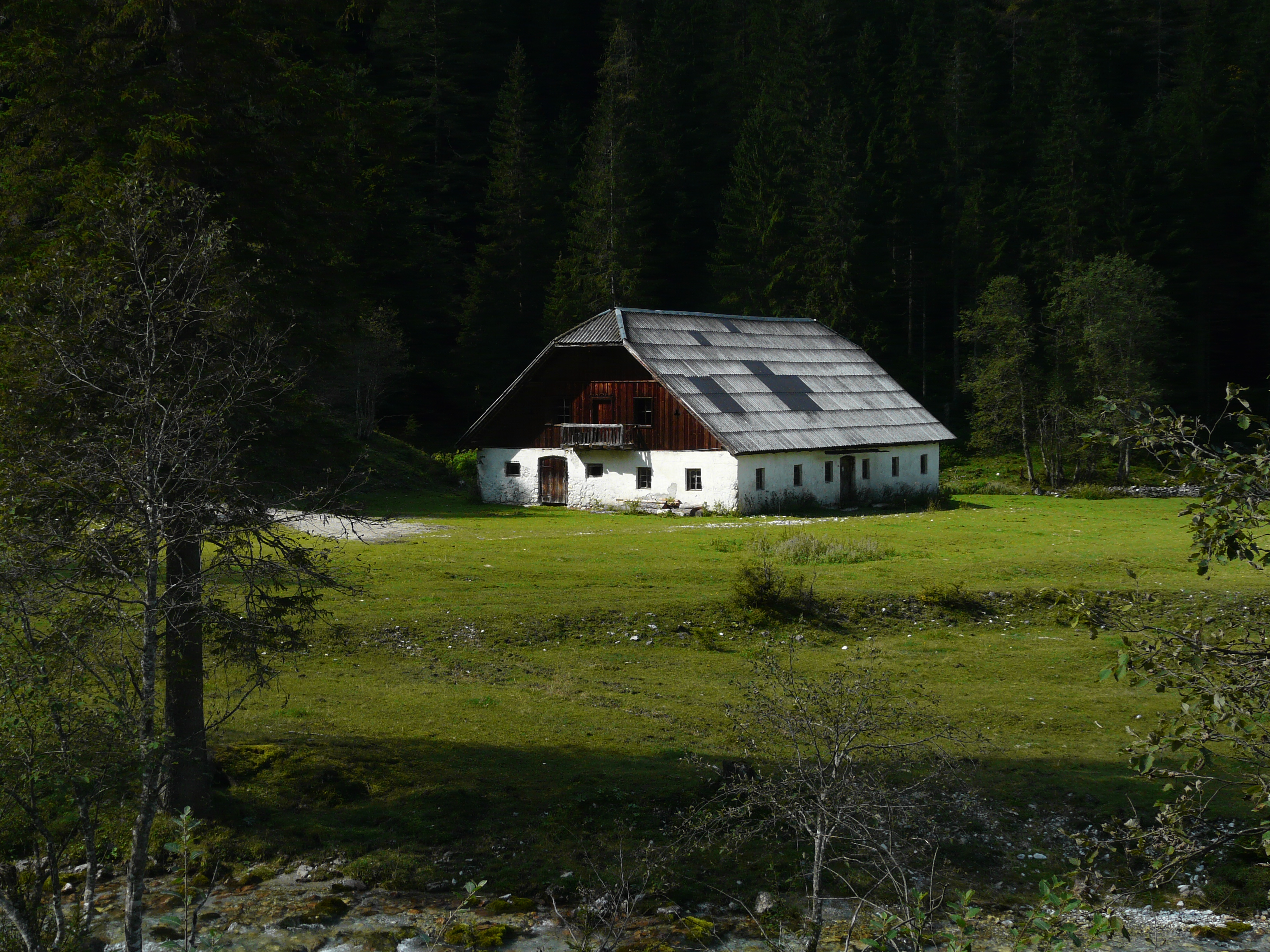 Die am Talschluss des Kleinartals gelegene Schwabalm in den Radstädter Tauern